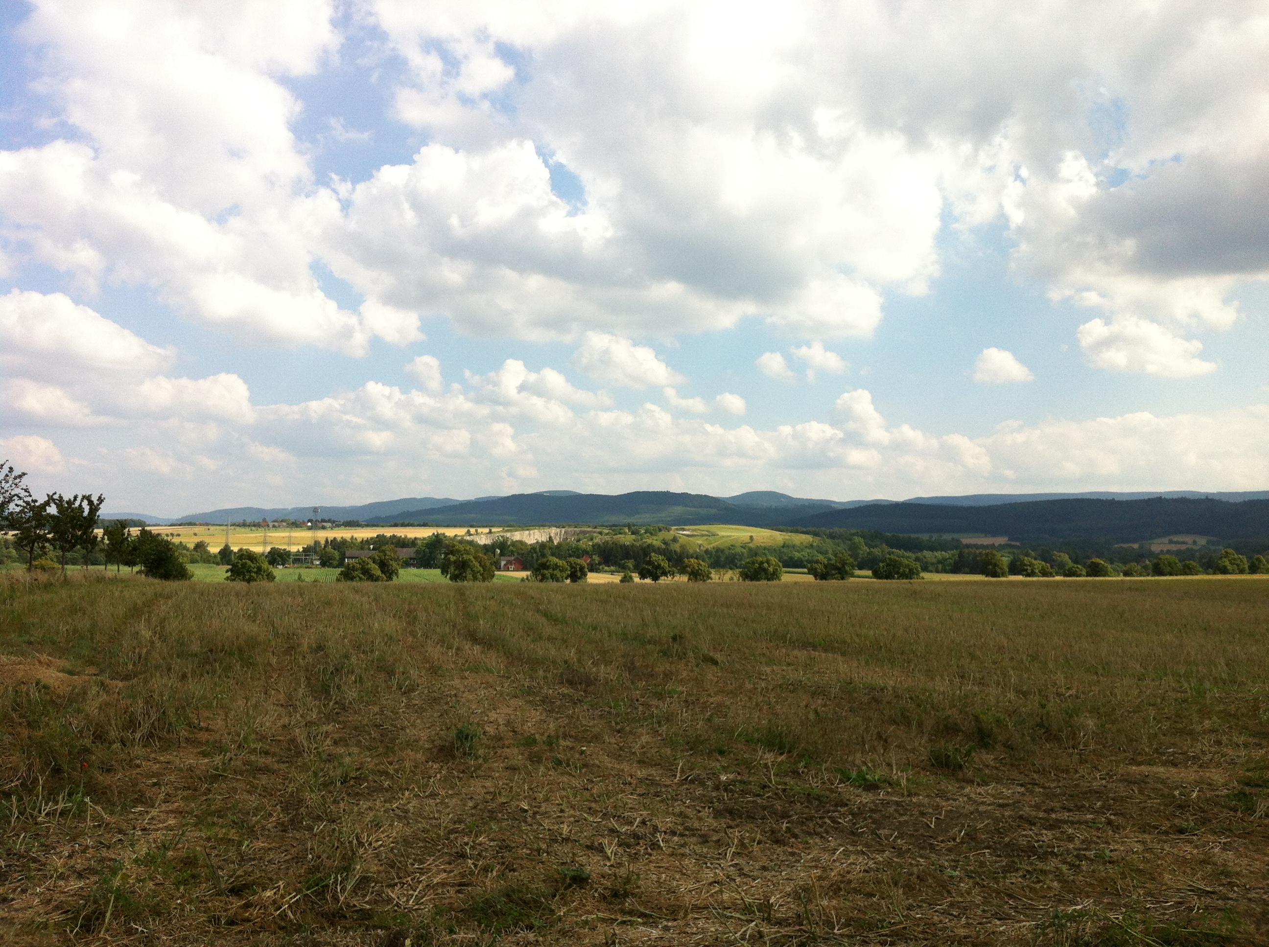 Der Kanstein in Langelsheim im Mittelgrund des Bildes (heller Bereich) mit heutigem Steinbruch aus nördlicher Richtung. Unmittelbar davor das Tal der Innerste. Dahinter der Harz.